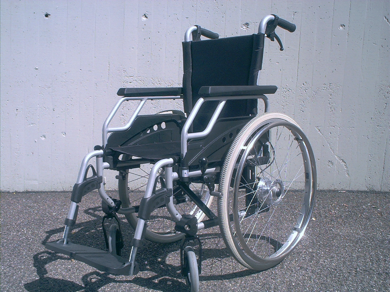 Leichtgewicht-Rollstuhl mit 24" Antriebsrädern, Steckachsen, 2 Druckbremsen für den Fahrer und 2 Trommelbremsen für den Begleiter. Hersteller MEYRA Typ 1.805